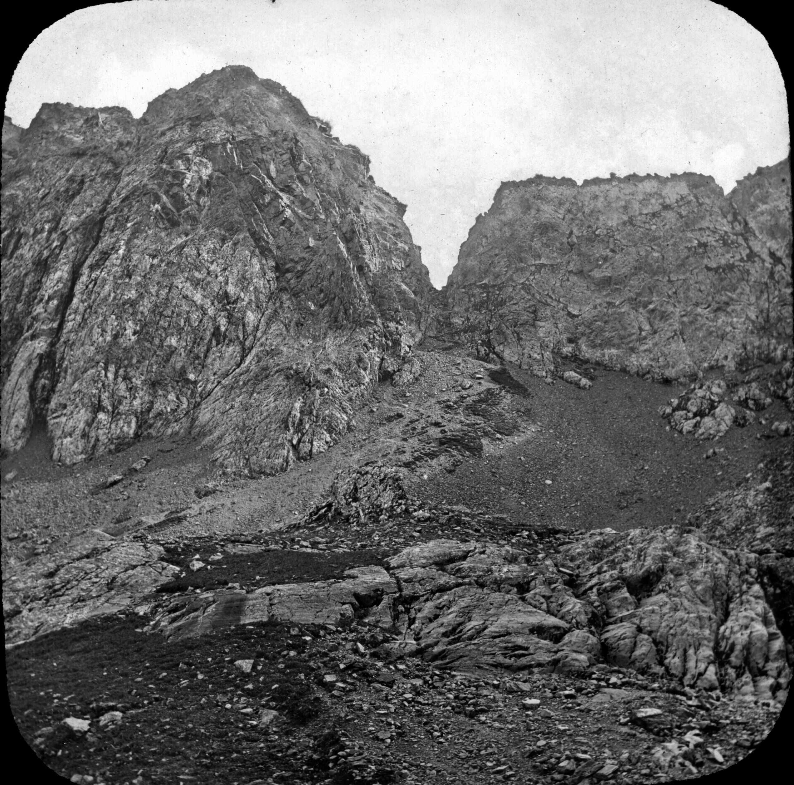 Port de Vénasque, photographie d'Eugène Trutat Fonds Trutat - Photographie ancienne Cote : TRU C 338 Localisation : Fonds ancien Original non communicable Titre : Port de Venasque, Luchon Auteur : Trutat, Eugène Rôle de l’auteur : Photographe Lieu de création : Bagnères-de-Luchon (Haute-Garonne ; canton) Date de création : : 19e siècle, 4e quart Mesures : 10 x 9 cm Mot(s)-clé(s) : -- Montagne -- Sommet (montagne) -- Col -- Bagnères-de-Luchon (Haute-Garonne ; canton) -- Venasque, Port de (France ; col) -- Pique (France ; haute-vallée) -- Luchonnais, Massif du (France) -- 19e siècle, 4e quart Médium : Photographies Médium : Positifs sur plaque de verre -- Noir et blanc -- Positifs au collodion sur plaque de verre -- Paysages de montagne Bibliothèque de Toulouse. Domaine public.